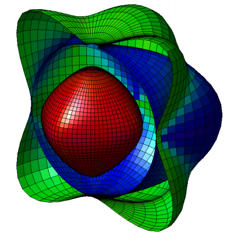 Surface des lenteurs pour un solide anisotrope